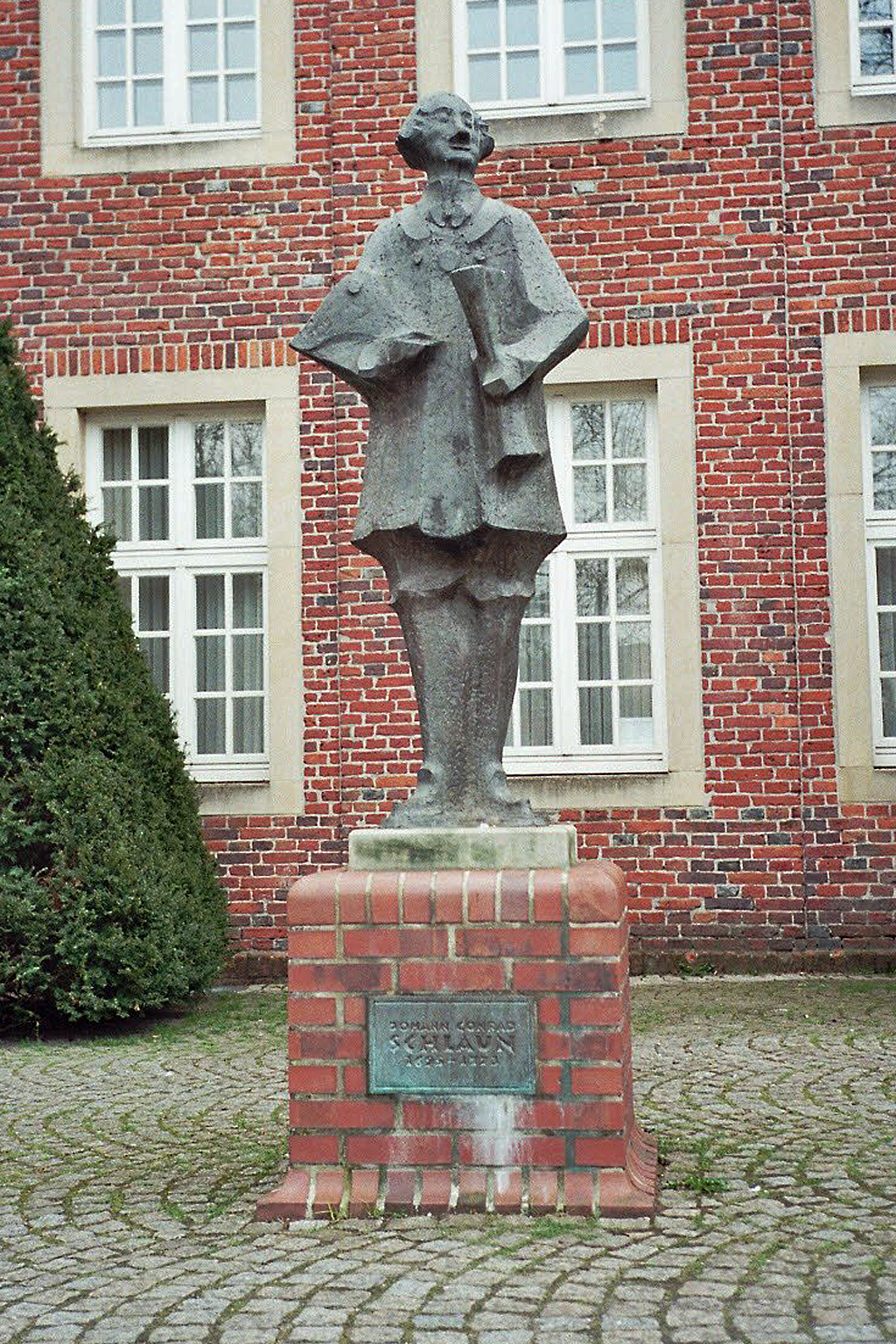 Das Denkmal für Johann Conrad Schlaun in Nottuln, Deutschland